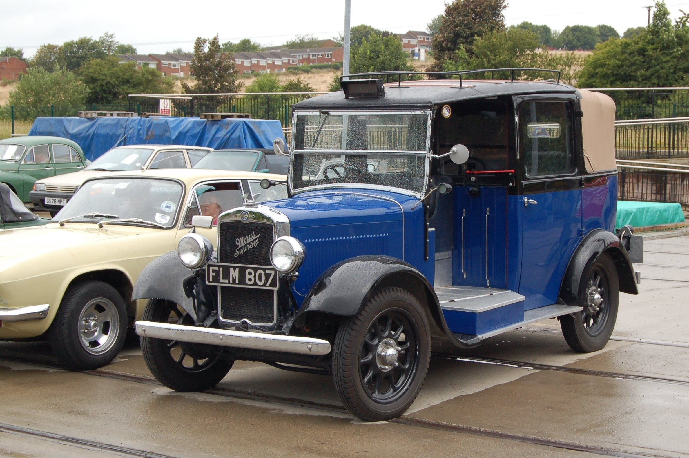 1939 Morris-Commercial Super-Six Taxicab